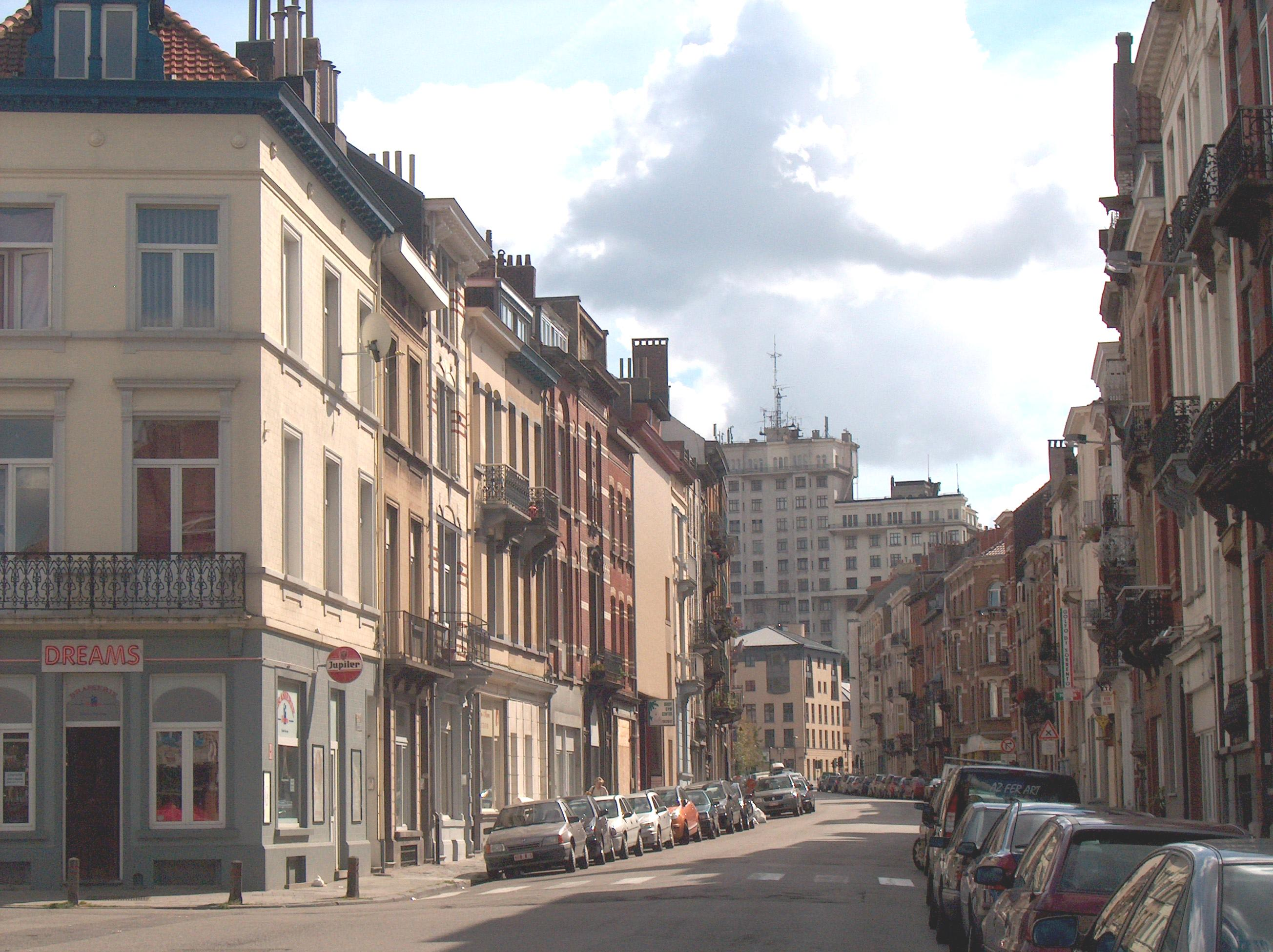 Bruxelles, Schaerbeek, rue du Noyer